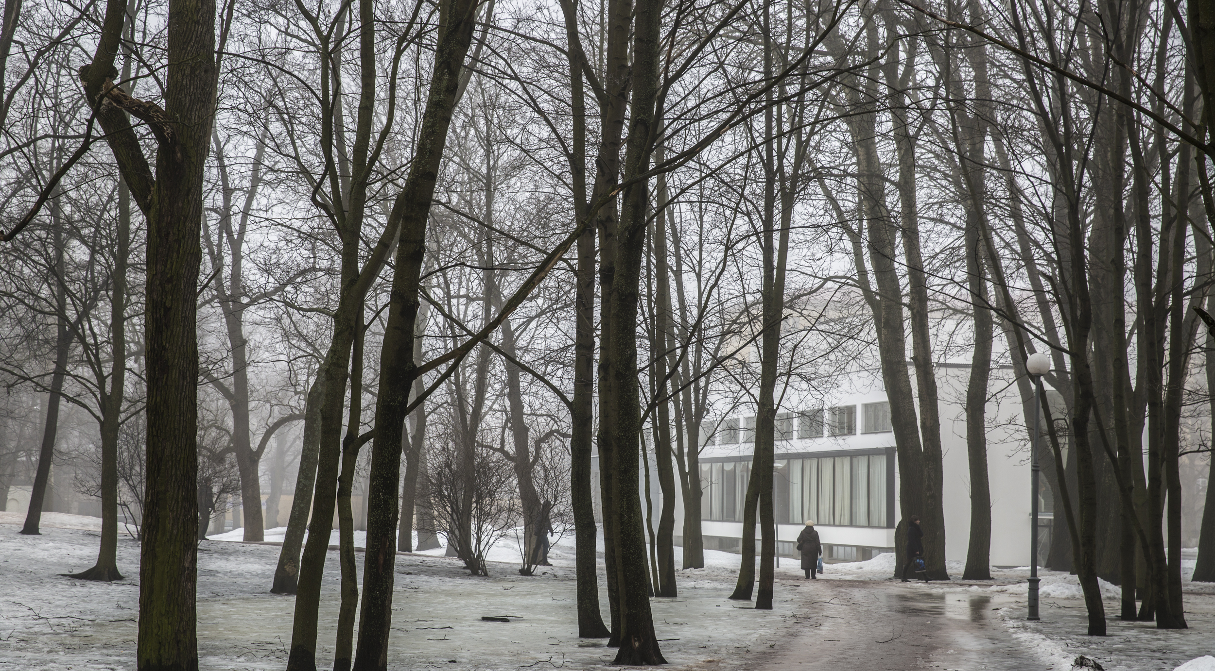 Alvar Aallon kirjasto Viipuri